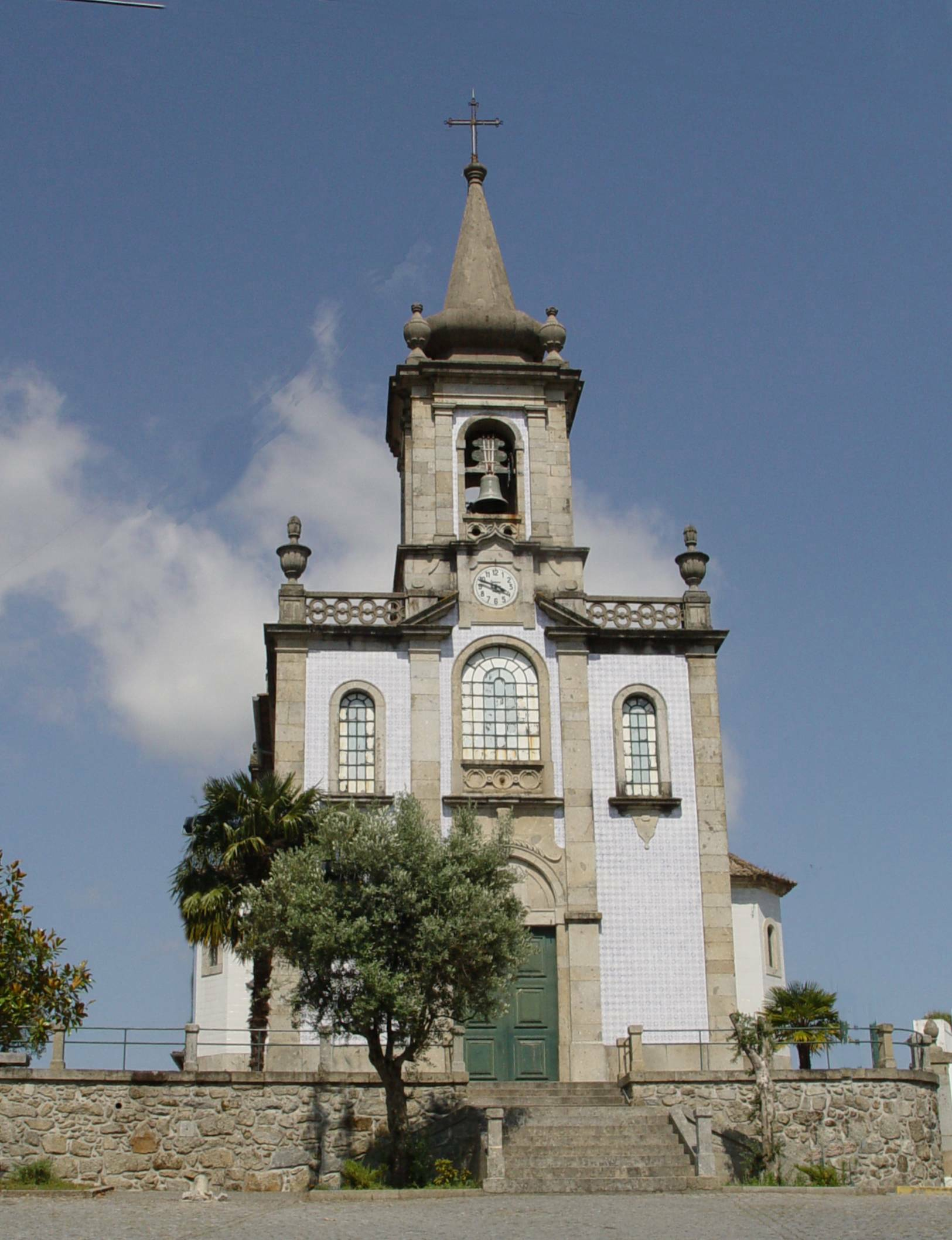 Palmeira's Church in Braga Portugal